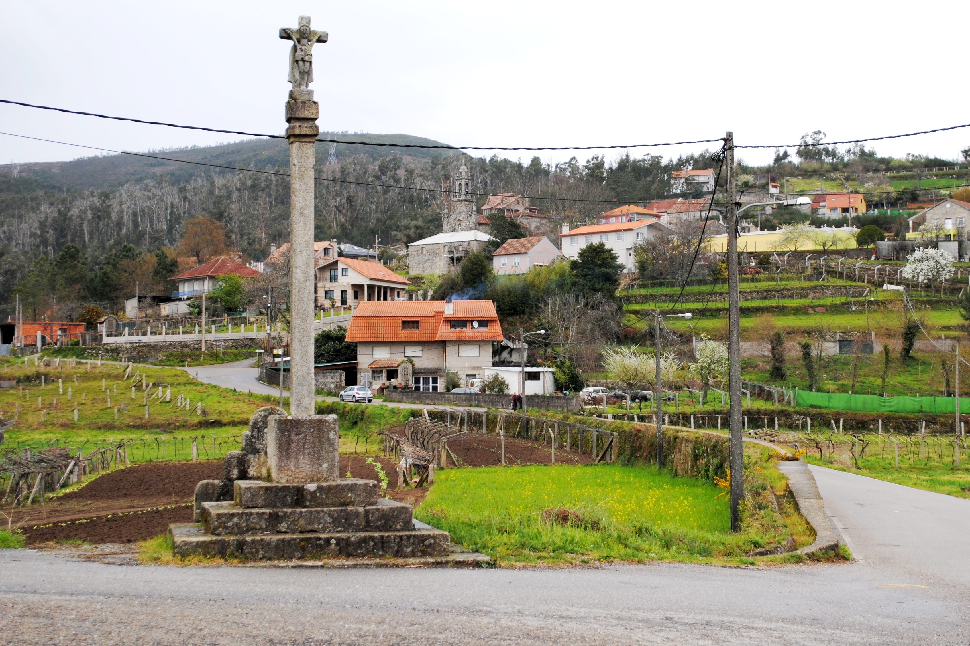 Cruceiro en Ventosela, Redondela